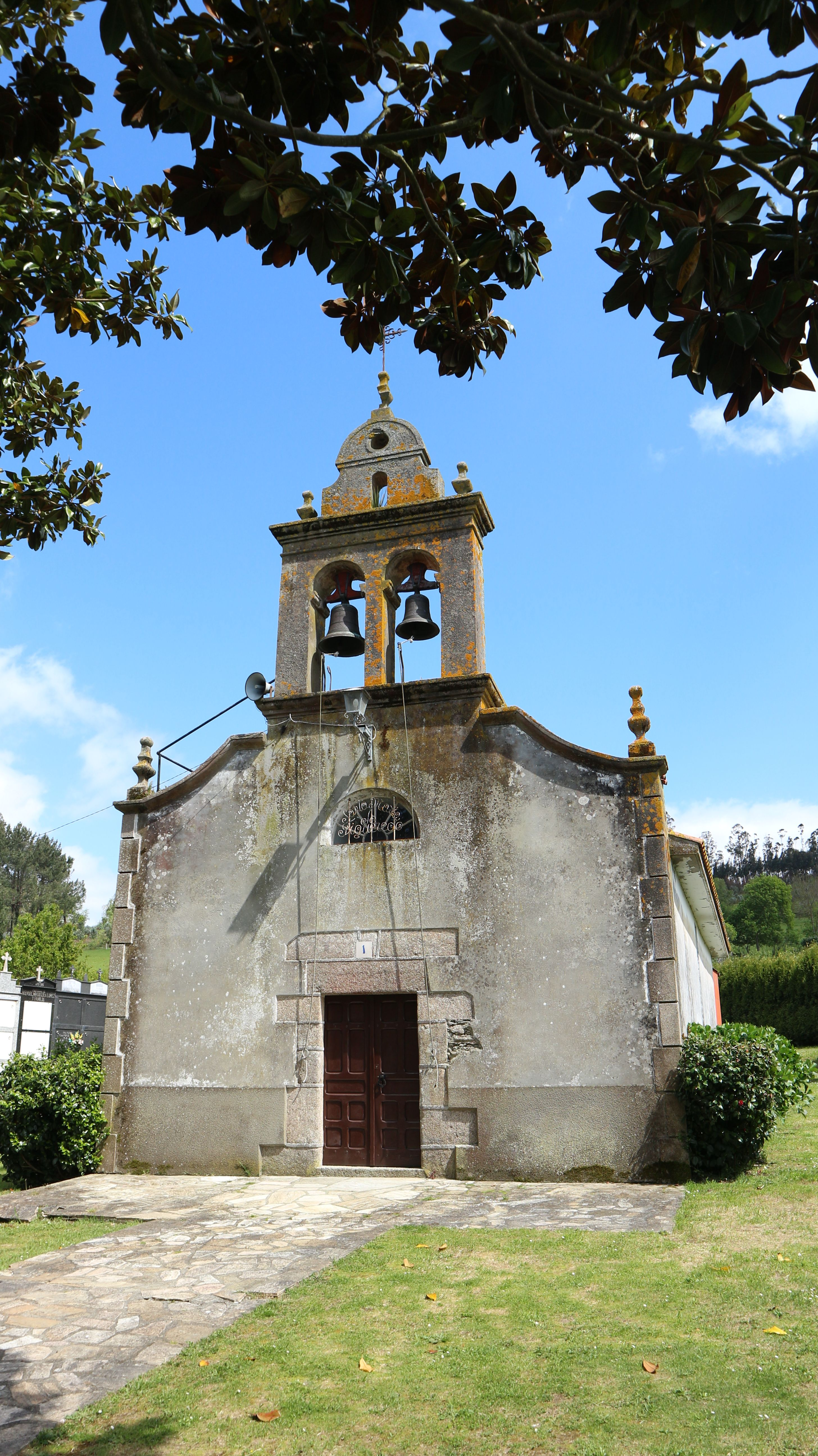 Igrexa de Santa María de Figueredo. Figueredo, Oza-Cesuras.